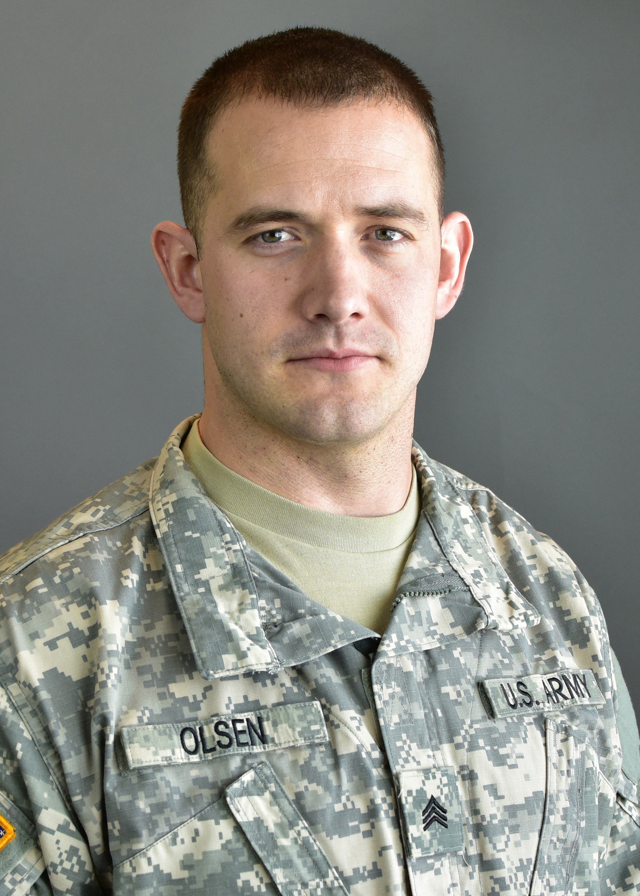 SGT JUSTIN OLSEN